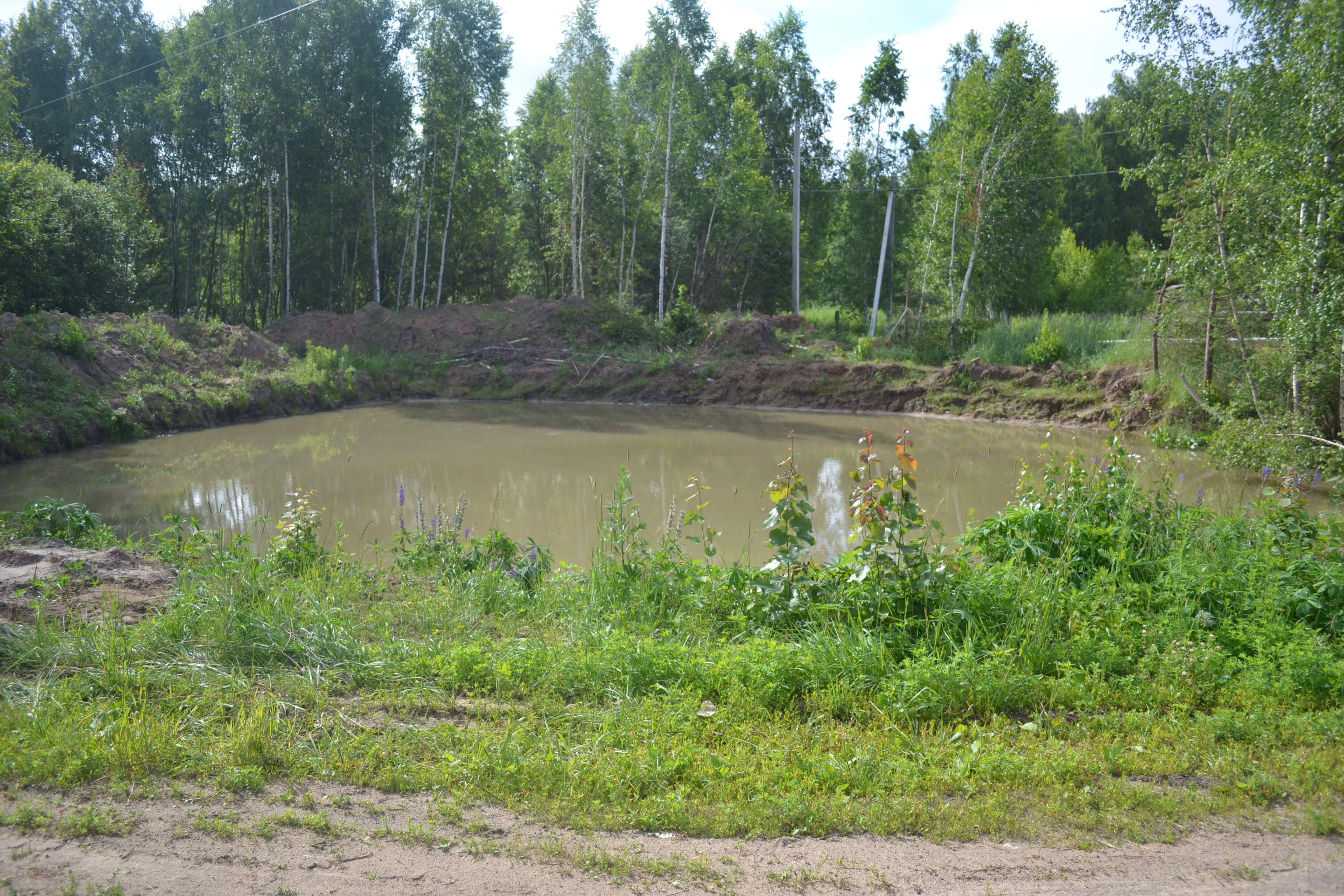 Пруд в деревне Югино (Шатурский район)